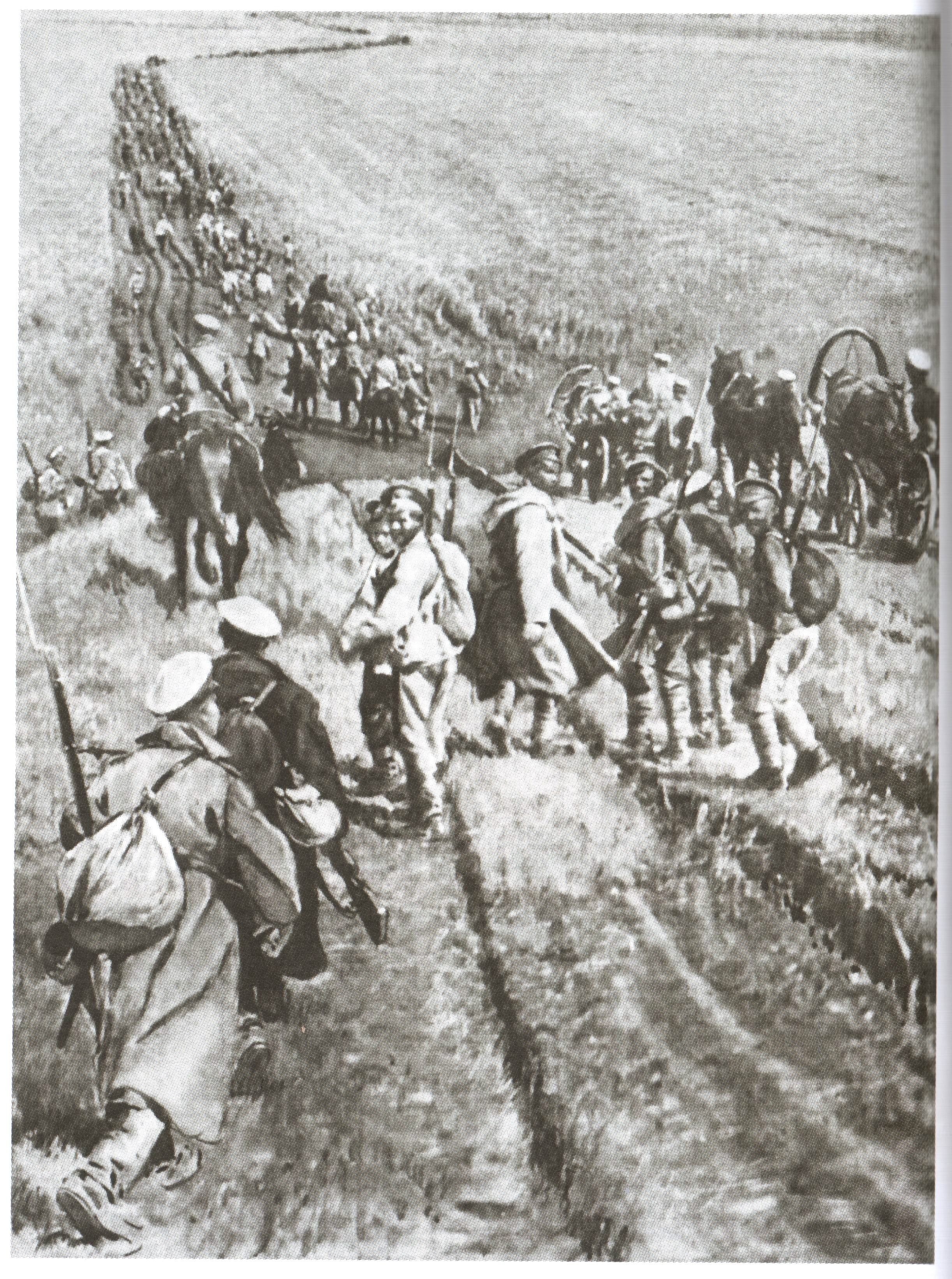 Отступление Восточного фронта Русской армии. Лето 1919